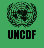 Logo von UNCDF